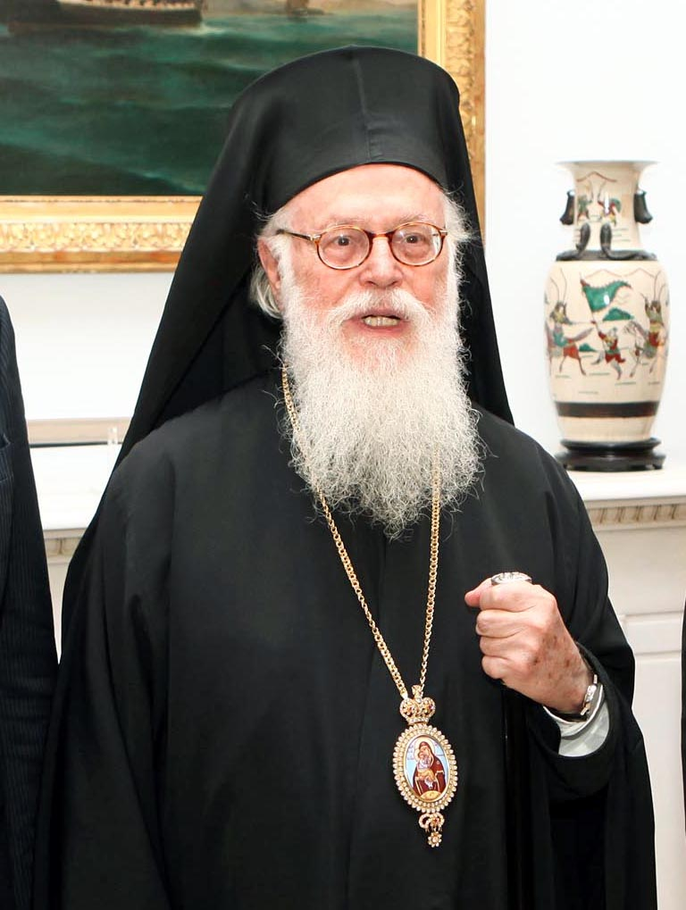 Tην Πέμπτη 19 Ιουλίου 2012, Αρχιεπίσκοπο Τιράνων, Δυρραχίου και πάσης Αλβανίας κ. Αναστάσιο